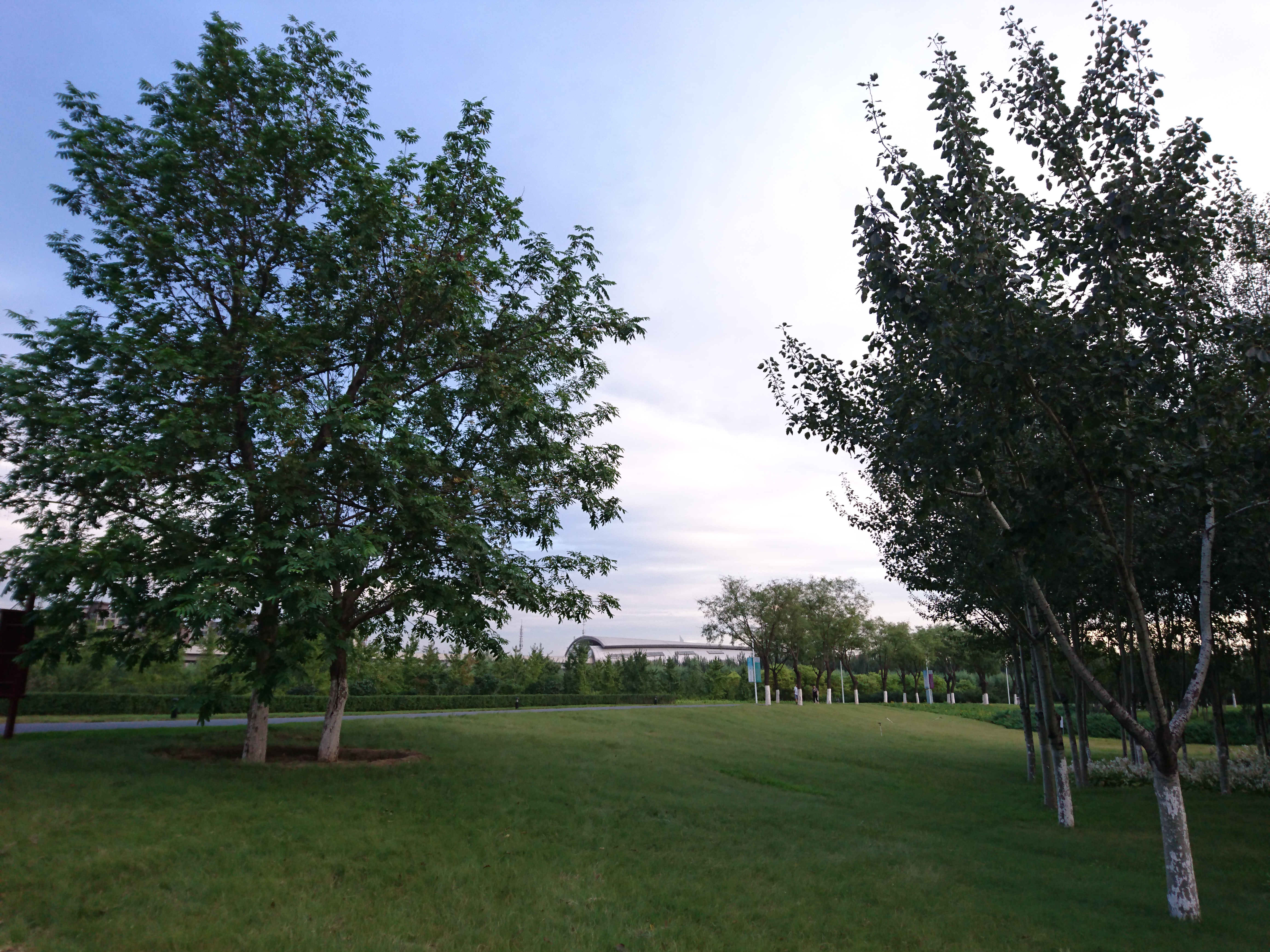 長陽新城浜水公園